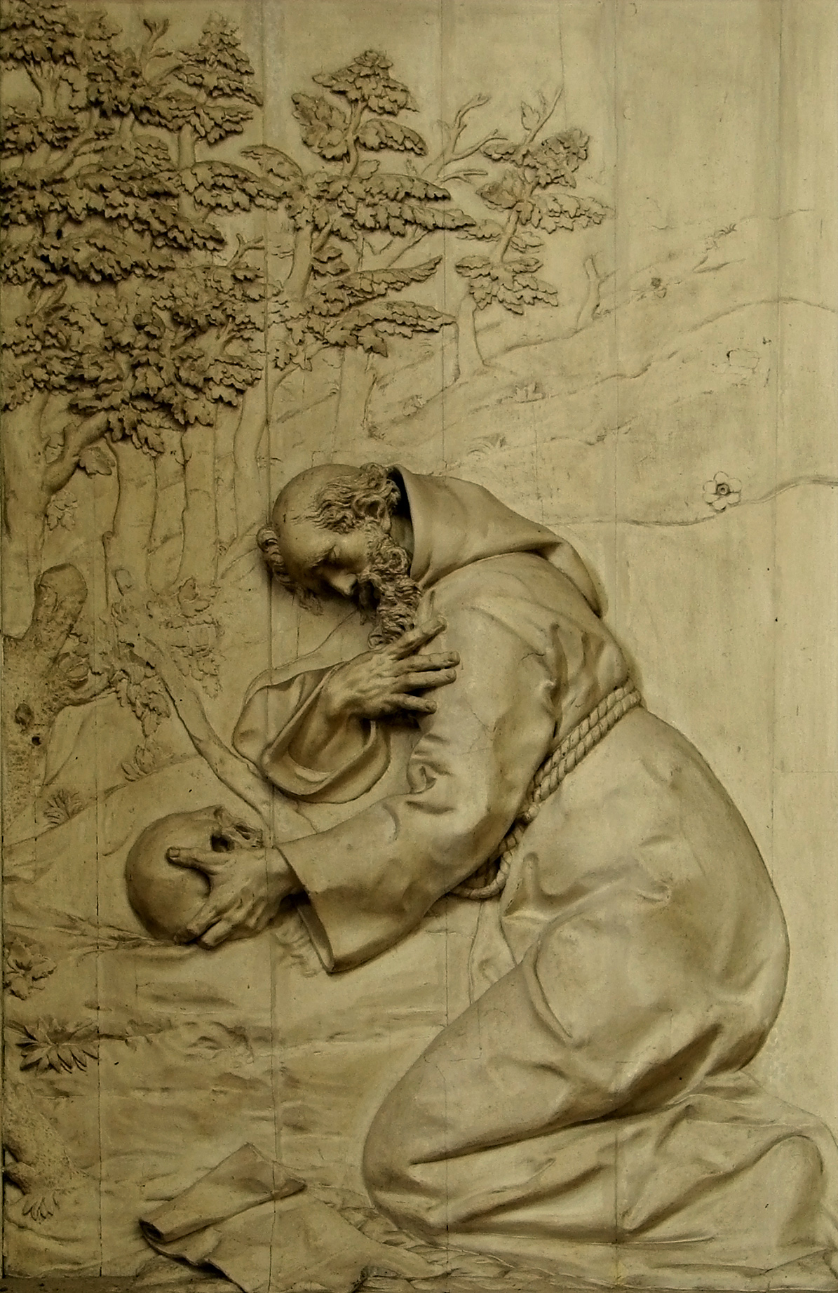 Bas-relief représentant Saint François d'Assise, au centre du retable sculpté par Jacques-Firmin Vimeux (entre 1775 et 1779).Chapelle Saint-Nicaise (1340) dite Saint-François-d'Assise, cathédrale Notre-Dame d'Amiens.